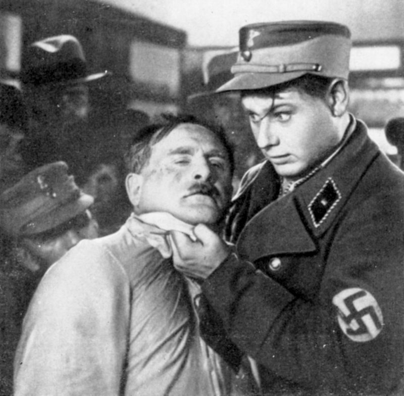 Кадр из фильма «Болотные солдаты» (СССР, 1938)